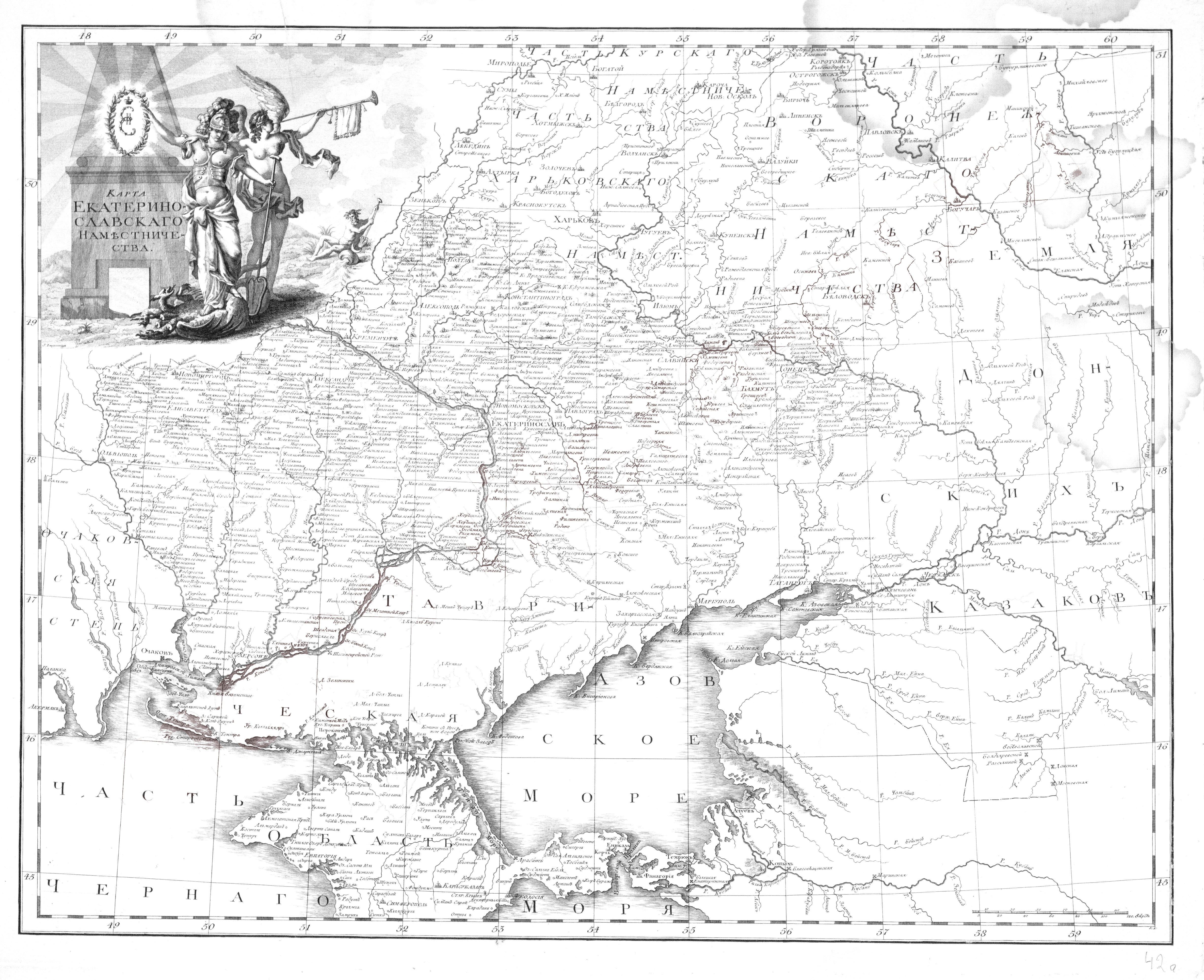 Катеринославське наміснитцтво